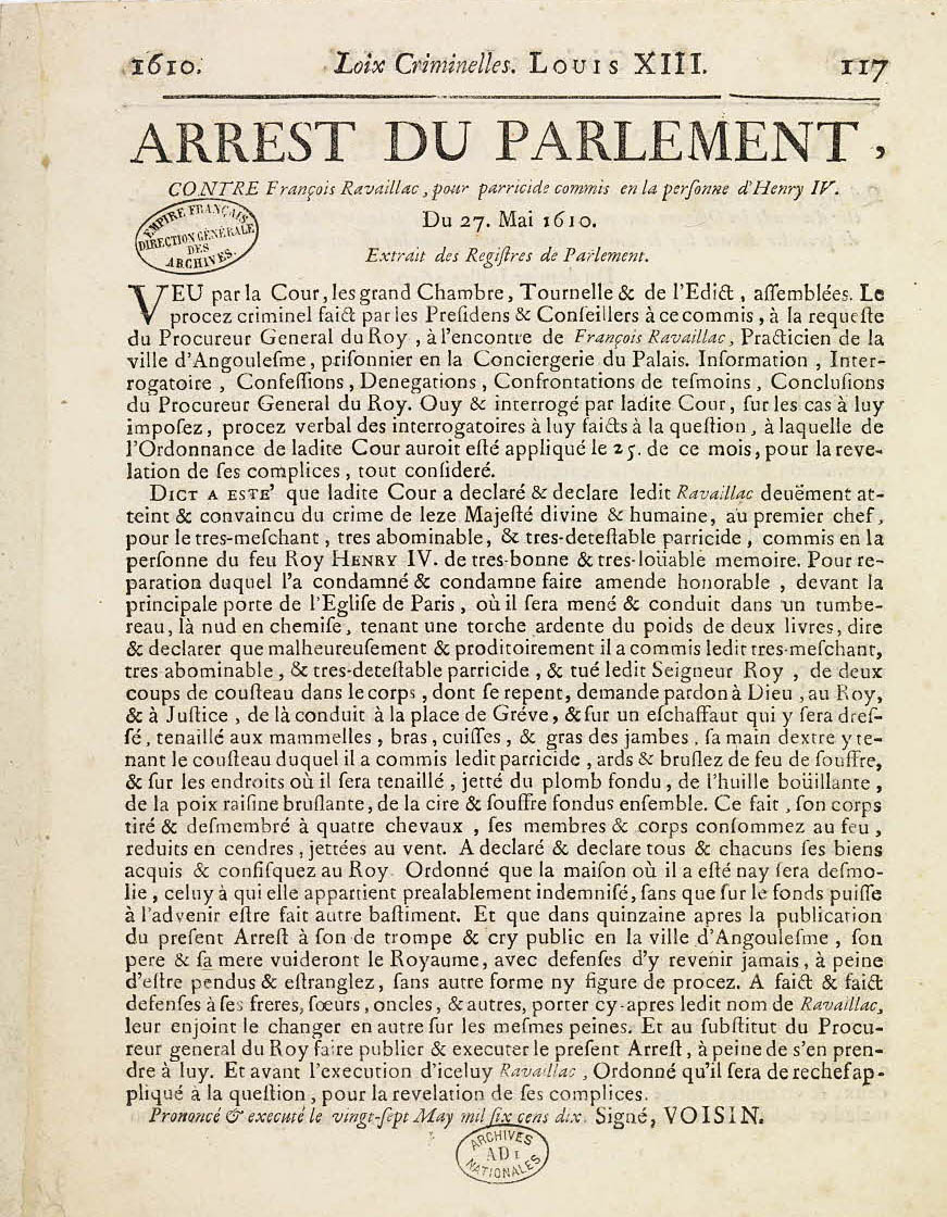 Arrêt du parlement de Paris condamnant à mort François Ravaillac, convaincu du crime de « lèse-majesté divine et humaine » le 27 mai 1610